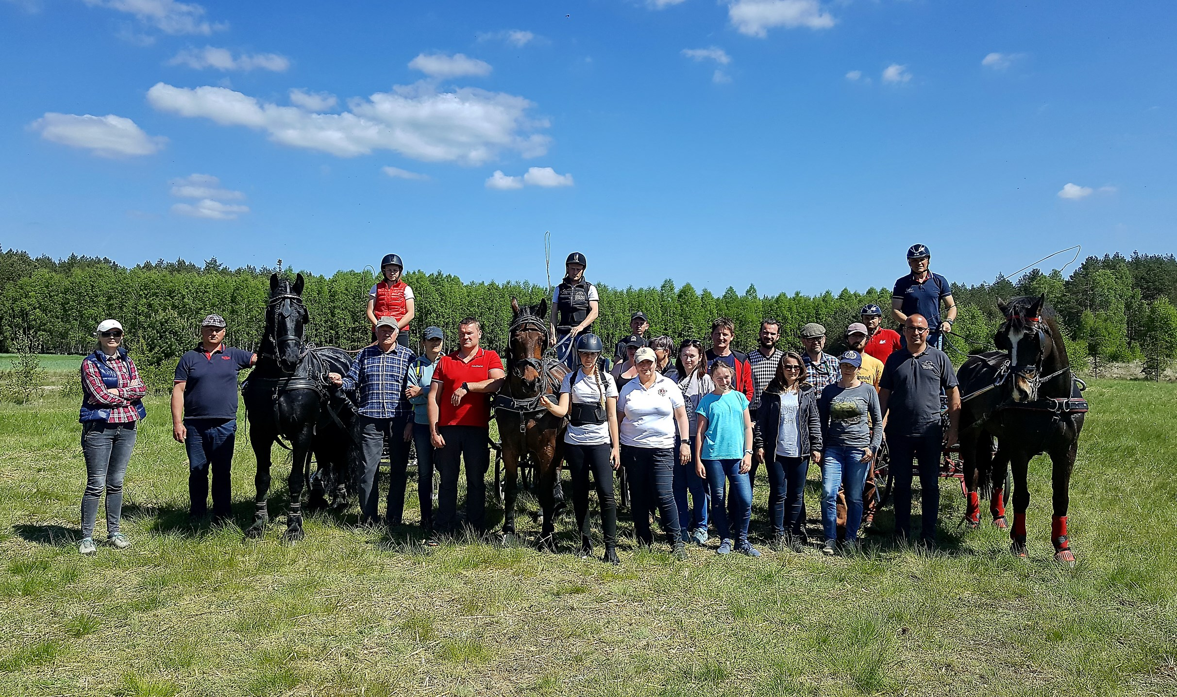 B. Kwiatek jako trener podczas szkolenia realizowanego przez Kaszubskie Stowarzyszenie Promowania Sportów Konnych w Kwiekach 2018 r.